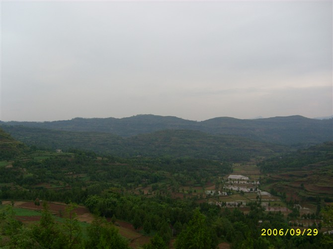 四川省南充市蓬安县诸家乡太极村一角